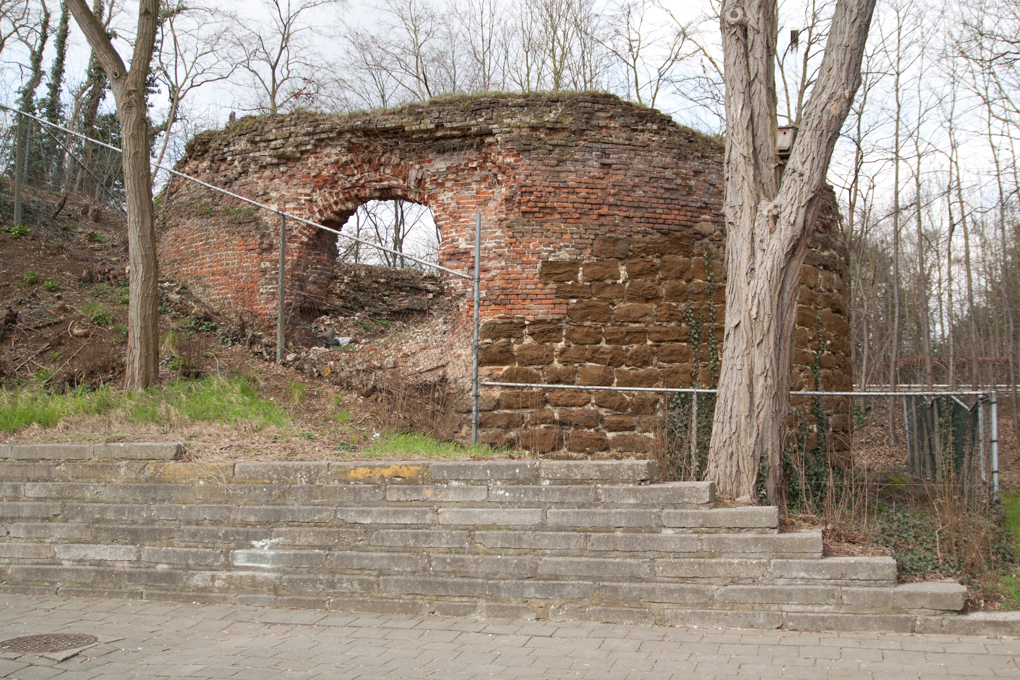 Het vervalllen en verwaarloosde stompje van de Verlorenkosttoren. Een van de laatste resten van de 2e stadsomwalling van Leuven